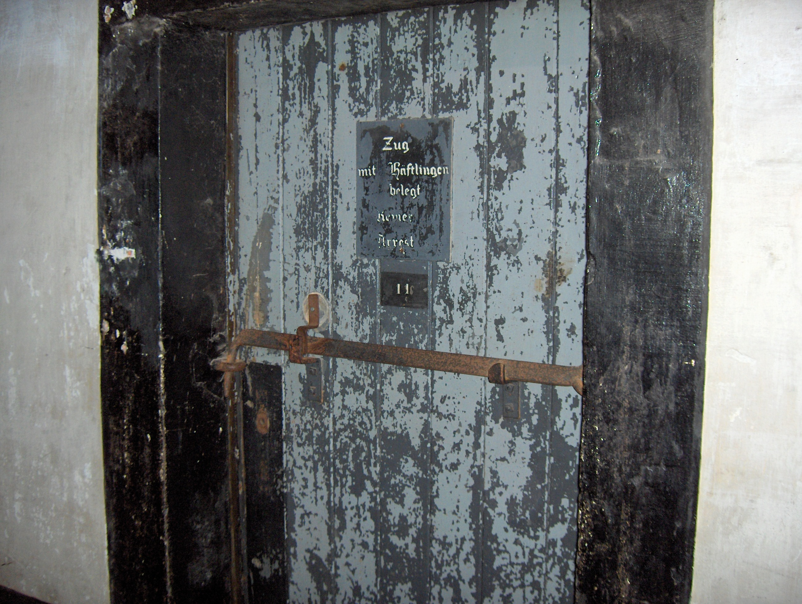 Door of a prisoners room in the Fort van Breendonk, Belgium